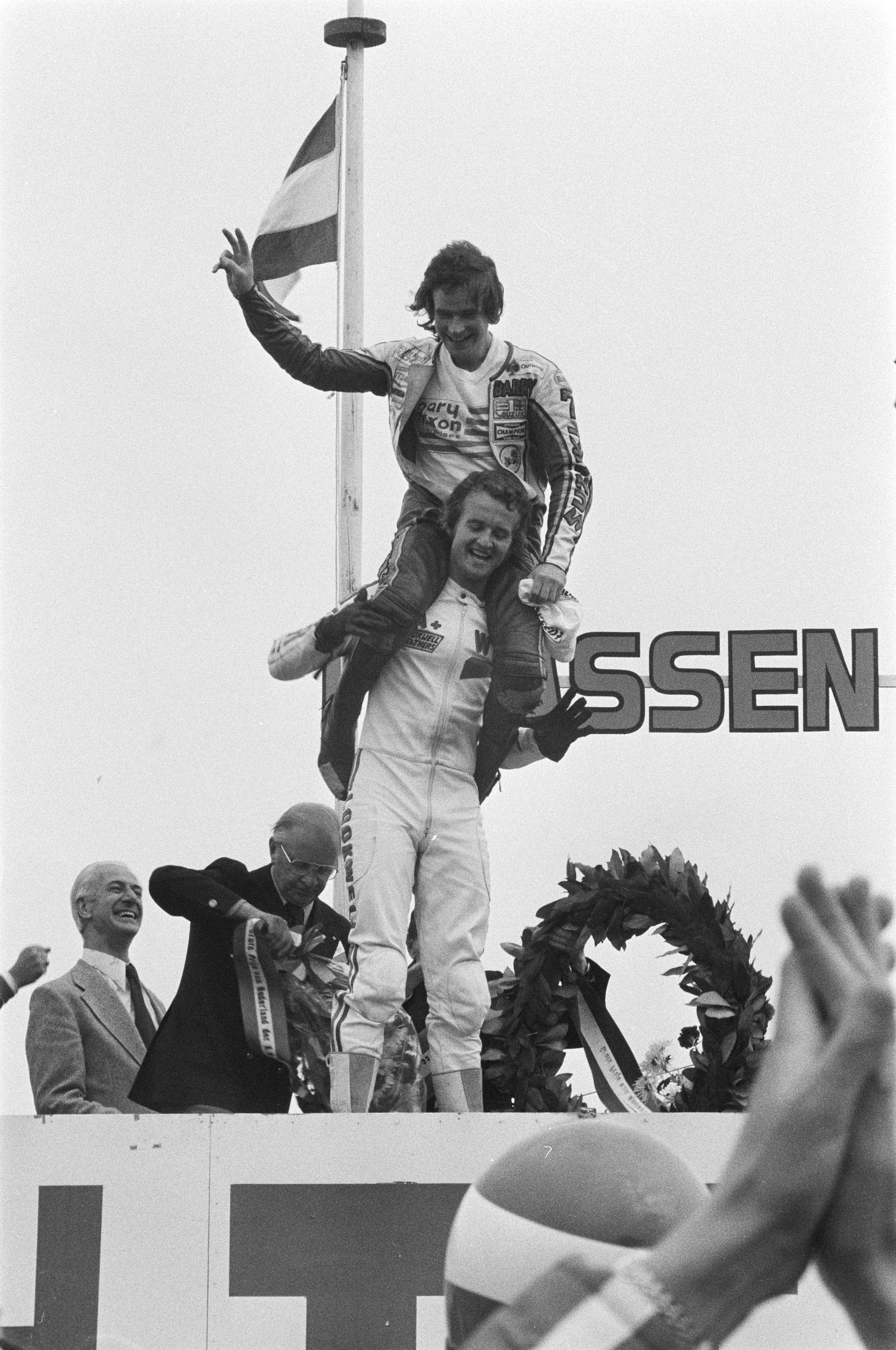 Collectie / Archief : Fotocollectie Anefo Reportage / Serie : TT Assen 1977 Beschrijving : TT Assen; Wil Hartog met op de schouders Barry Sheene Datum : 25 juni 1977 Locatie : Assen Trefwoorden : motorcoureurs, motorraces, motorsport Persoonsnaam : Hartog, Wil, Sheen, Barry Fotograaf : Suyk, Koen / Anefo Auteursrechthebbende : Nationaal Archief Materiaalsoort : Negatief (zwart/wit) Nummer archiefinventaris : bekijk toegang 2.24.01.05 Bestanddeelnummer : 929-2423